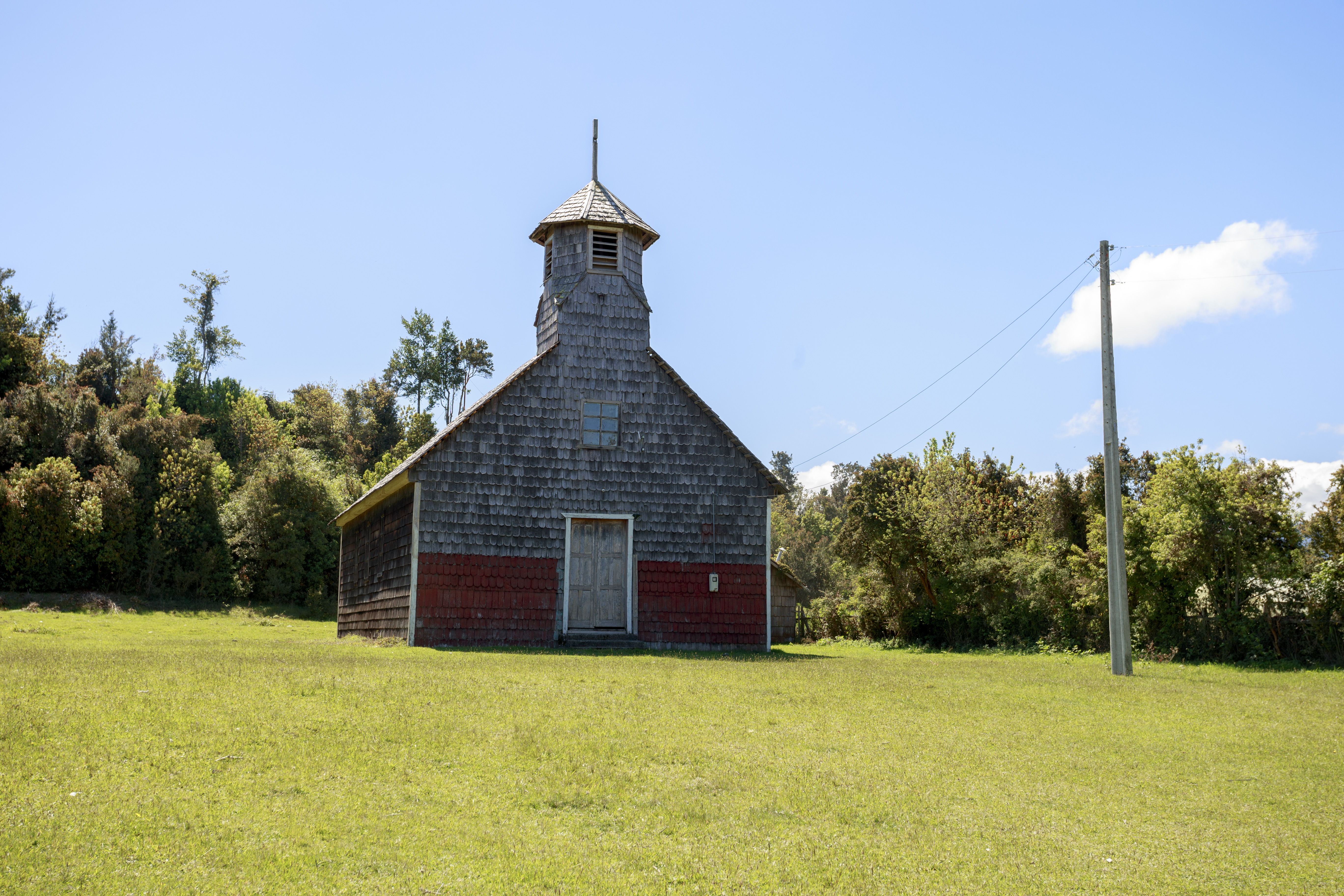 La capilla de la localidad La Poza, comuna Hualaihué, fue declarada monumento nacional en 2017